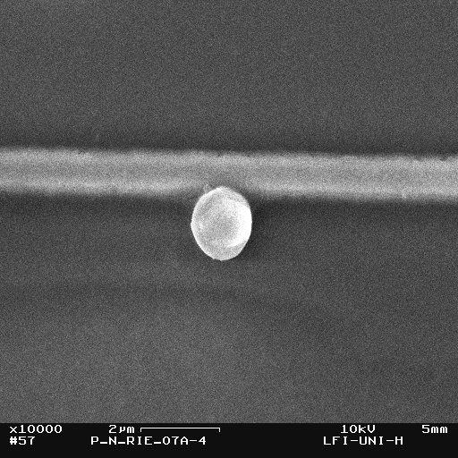 Aufnahme eines Ausfallortes verursacht durch Elektromigration in einer Kupferleiterbahn unter dem Rasterelektronenmikroskop. Die Passivierung wurde vorher durch Reactive Ion Etching (RIE) und Fluorwasserstoffsäure (HF) entfernt. Die Ätzprozesse sind dabei nicht erprobt gewesen und beruhen auf Versuchen das bestmögliche Resultat zu erlangen.